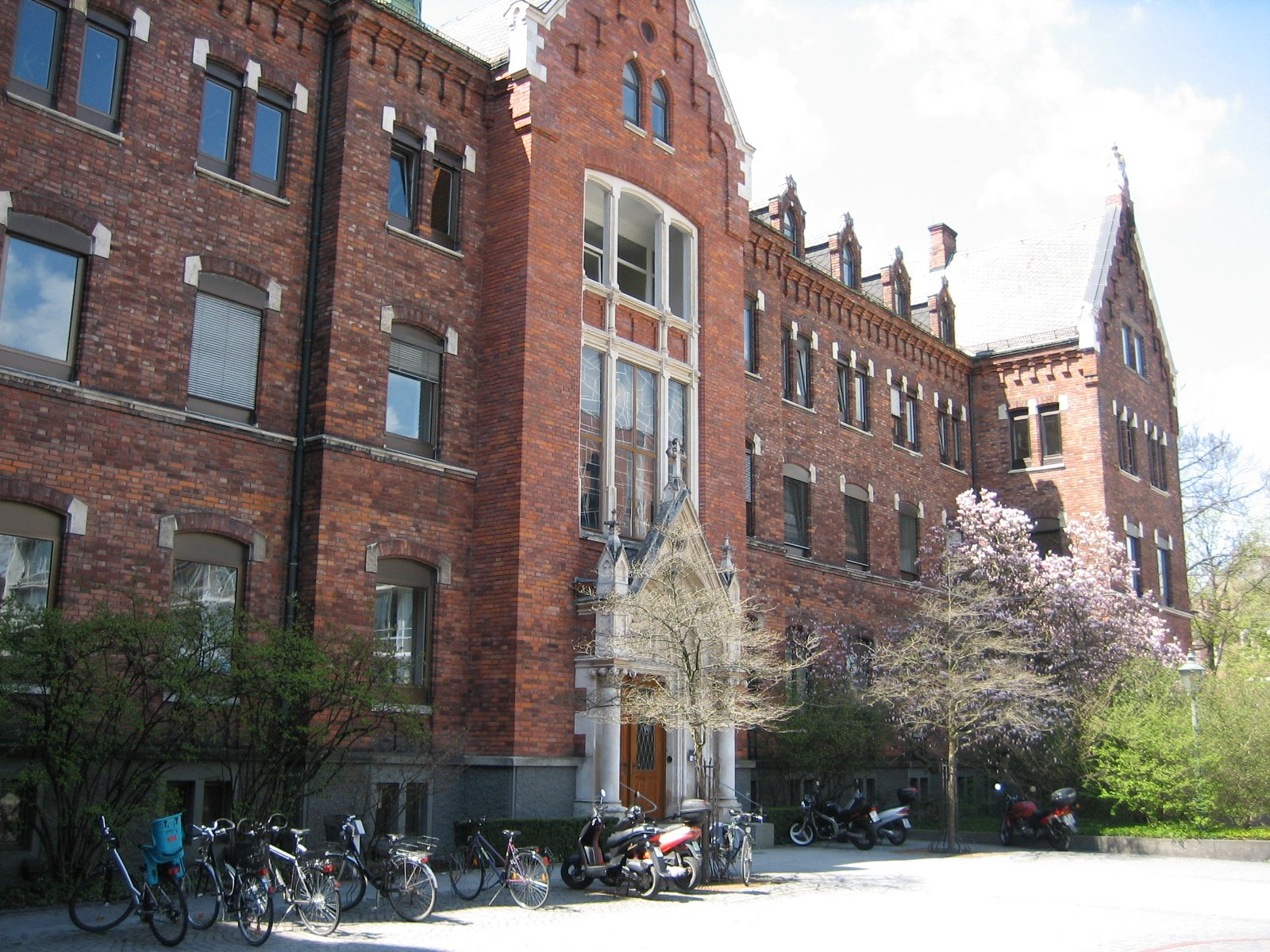 Diakonissenkrankenhaus Augsburg, Trakt mit der Kapelle im Krankenhaus